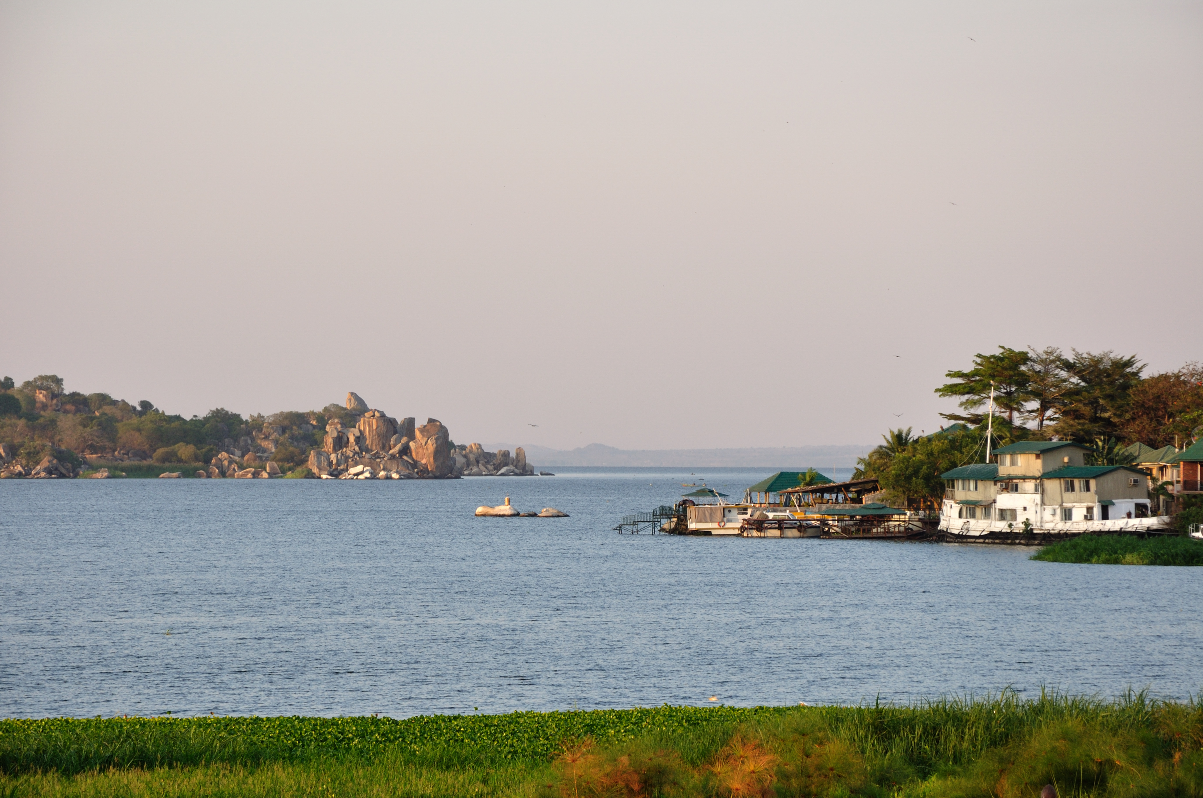 Tanzania, Lake Victoria in Mwanza